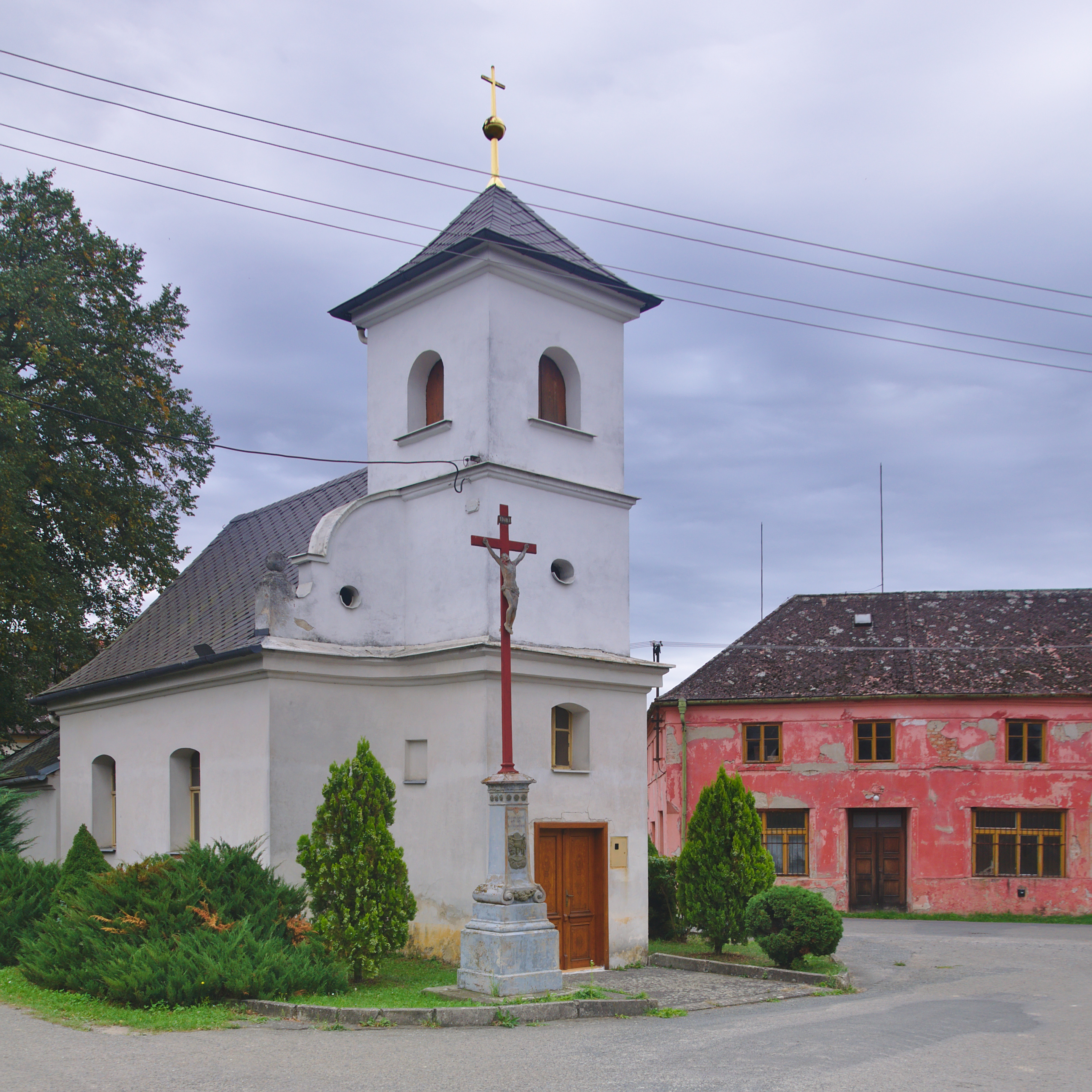 Kaple svaté Anny, Lutotín, Bílovice-Lutotín, okres Prostějov